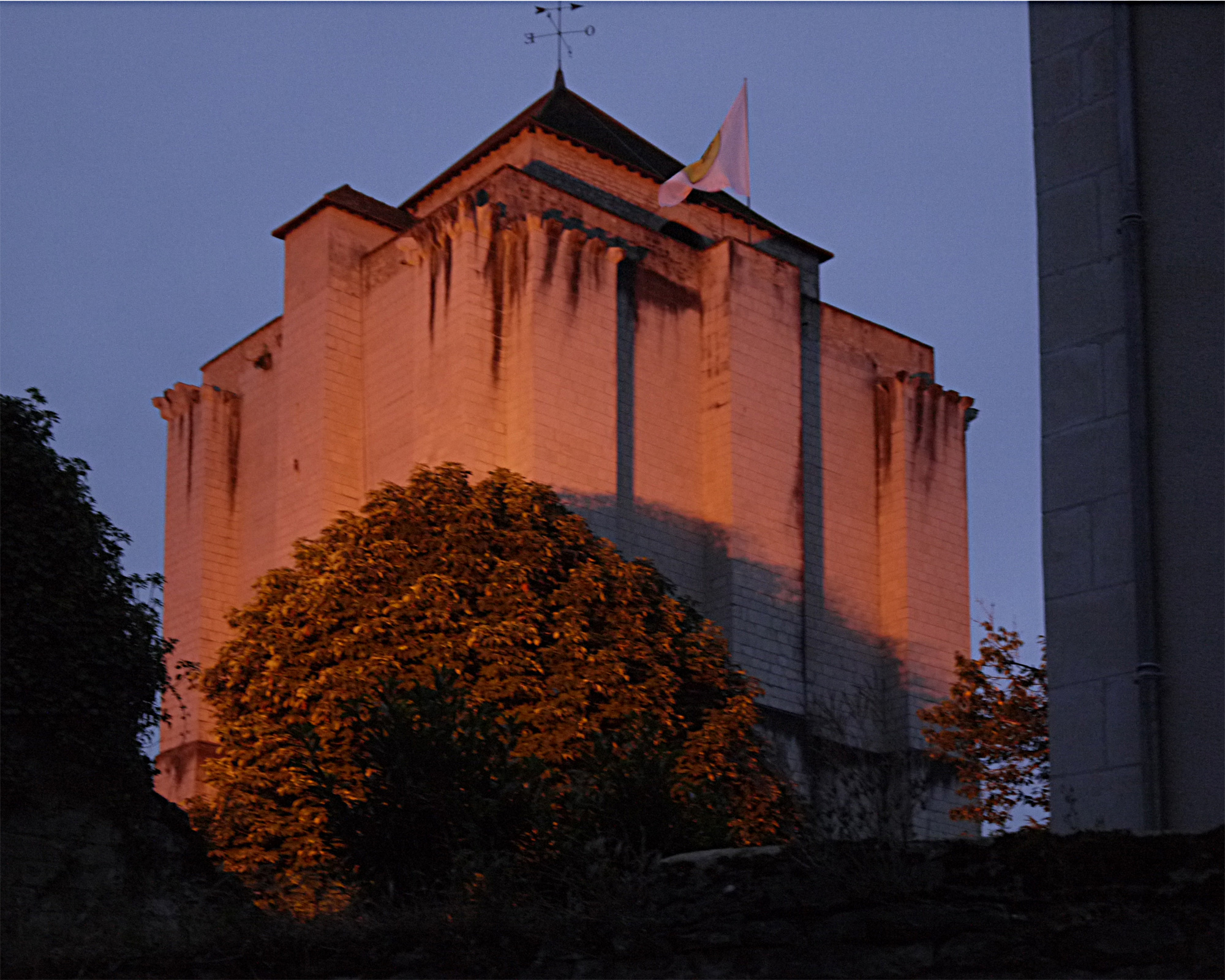 Le donjon de La Roche-Posay - partie haute, vue depuis un angle, au coucher du soleil